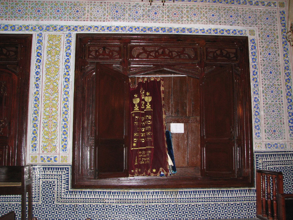 Morocco 001